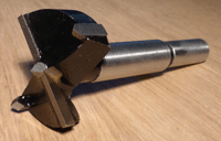 Kunstbohrer Z2+V2 mit HW-Schneiden (Kunstbohrer mit Zentrierspitze und Vorschneider, Z2 +V2 aus Hartmetall-Wood, Abgesetzter zylindrischen Schaft 10x30mm )